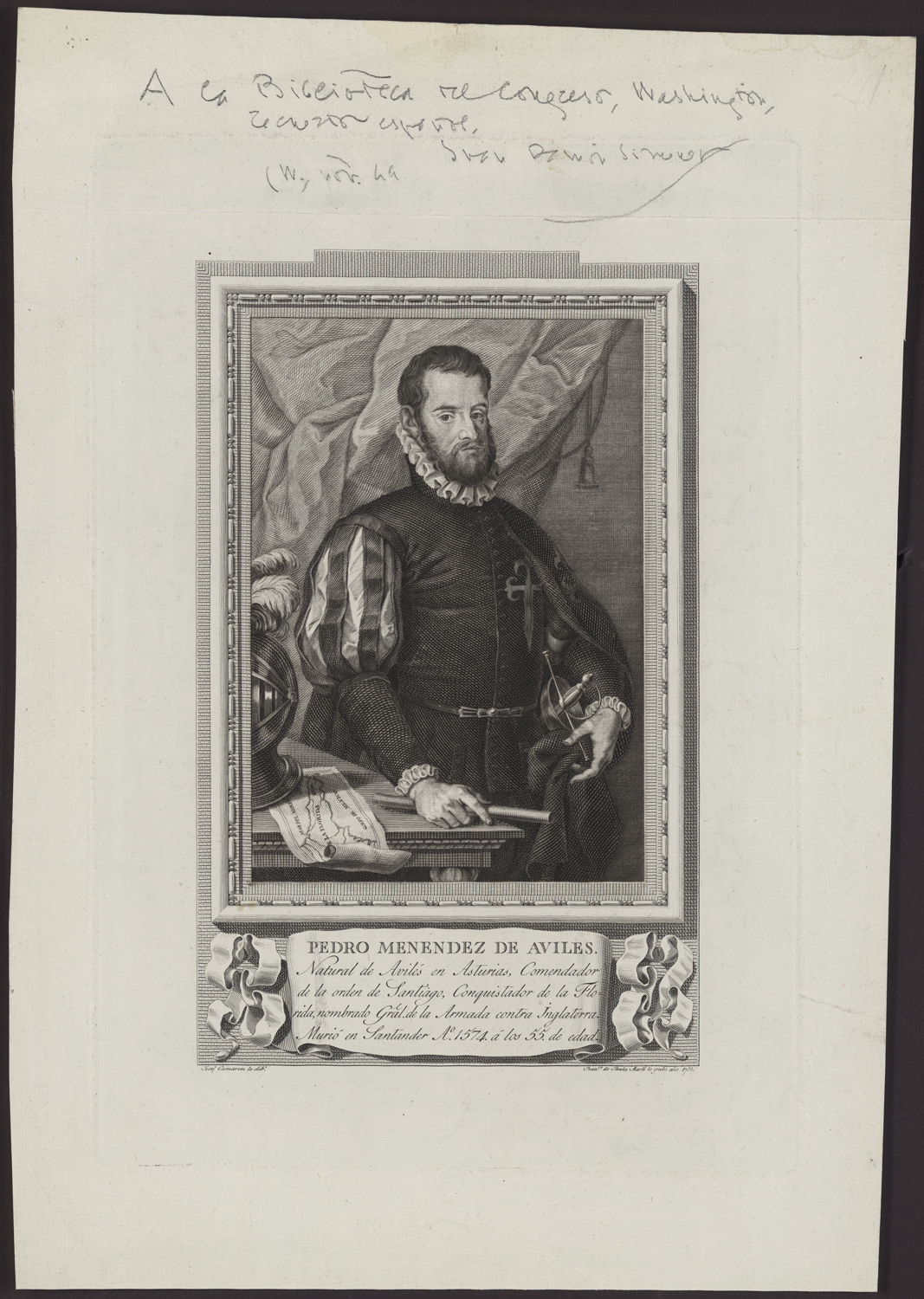 Pedro Menéndez de Avilés, engraving